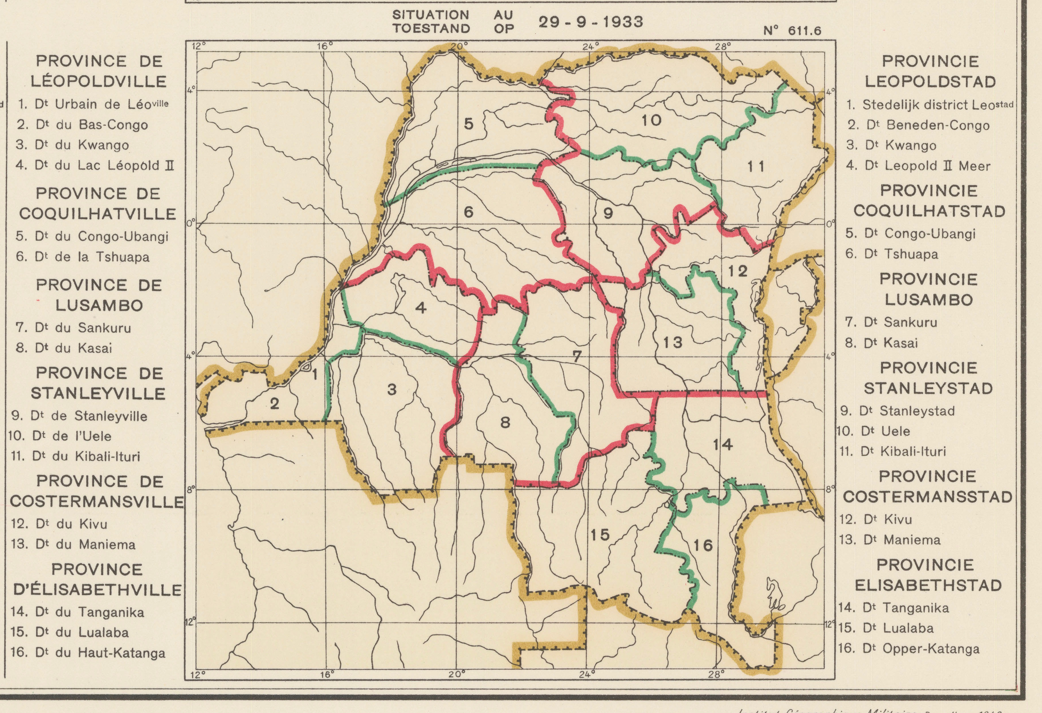 Carte des subdivisions administrative